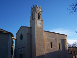 Église Saints-Pierre-et-Paul du 18ème siècle (Cazouls-d'Hérault).